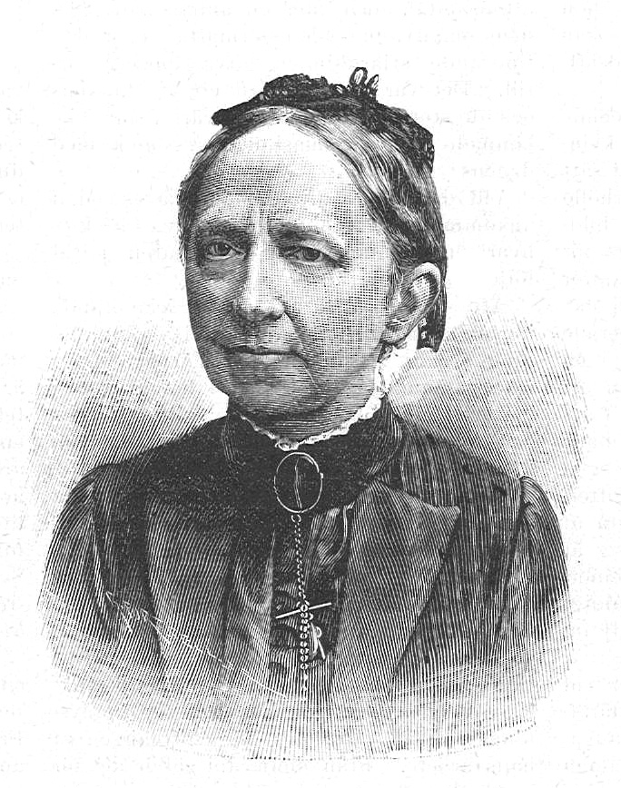 Eva Fryxell (1829-1920)